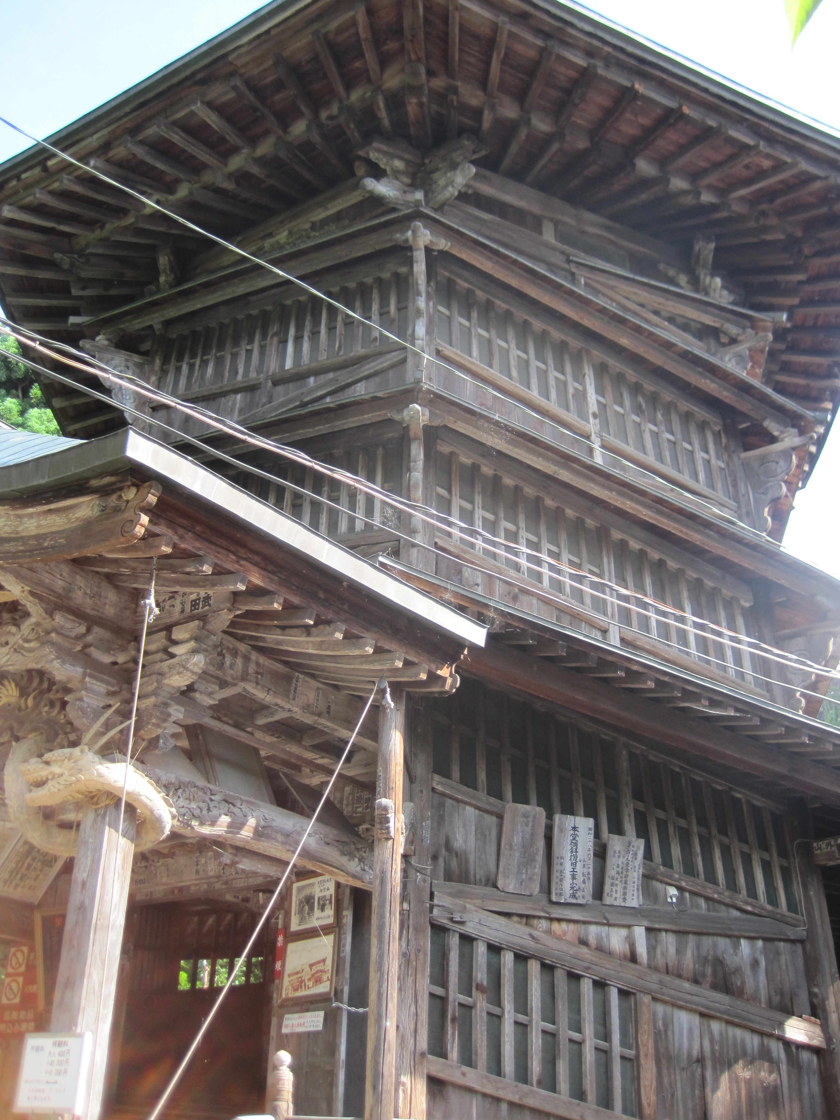 さざえ堂